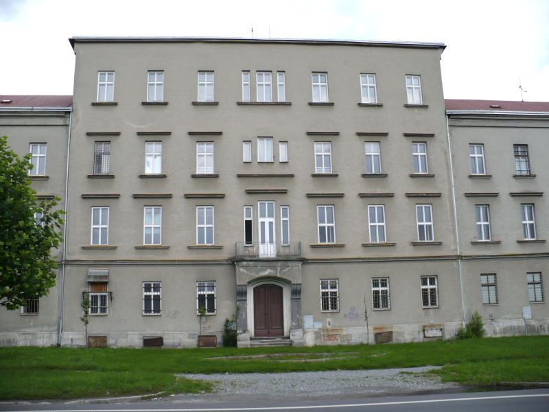 reálka - východní budova Vojenské akademie v Hranicích